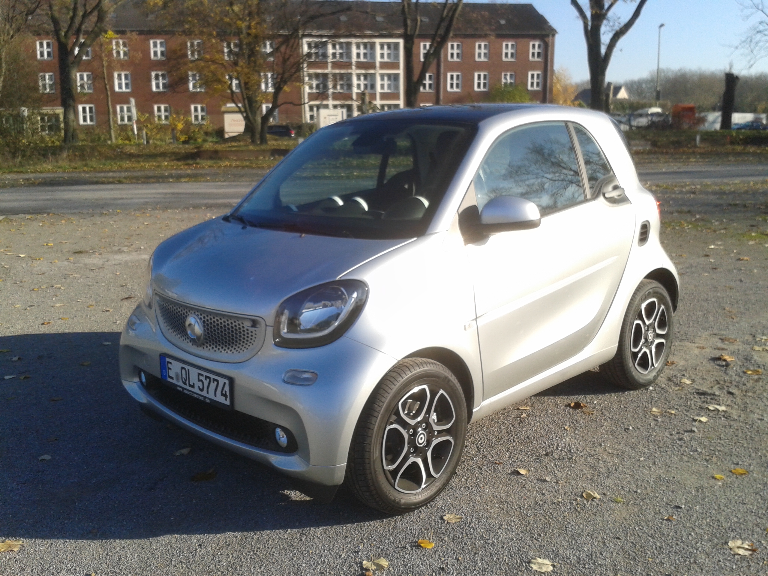 smart fortwo (Baureihe 453), Ausstattungslinie "Prime"